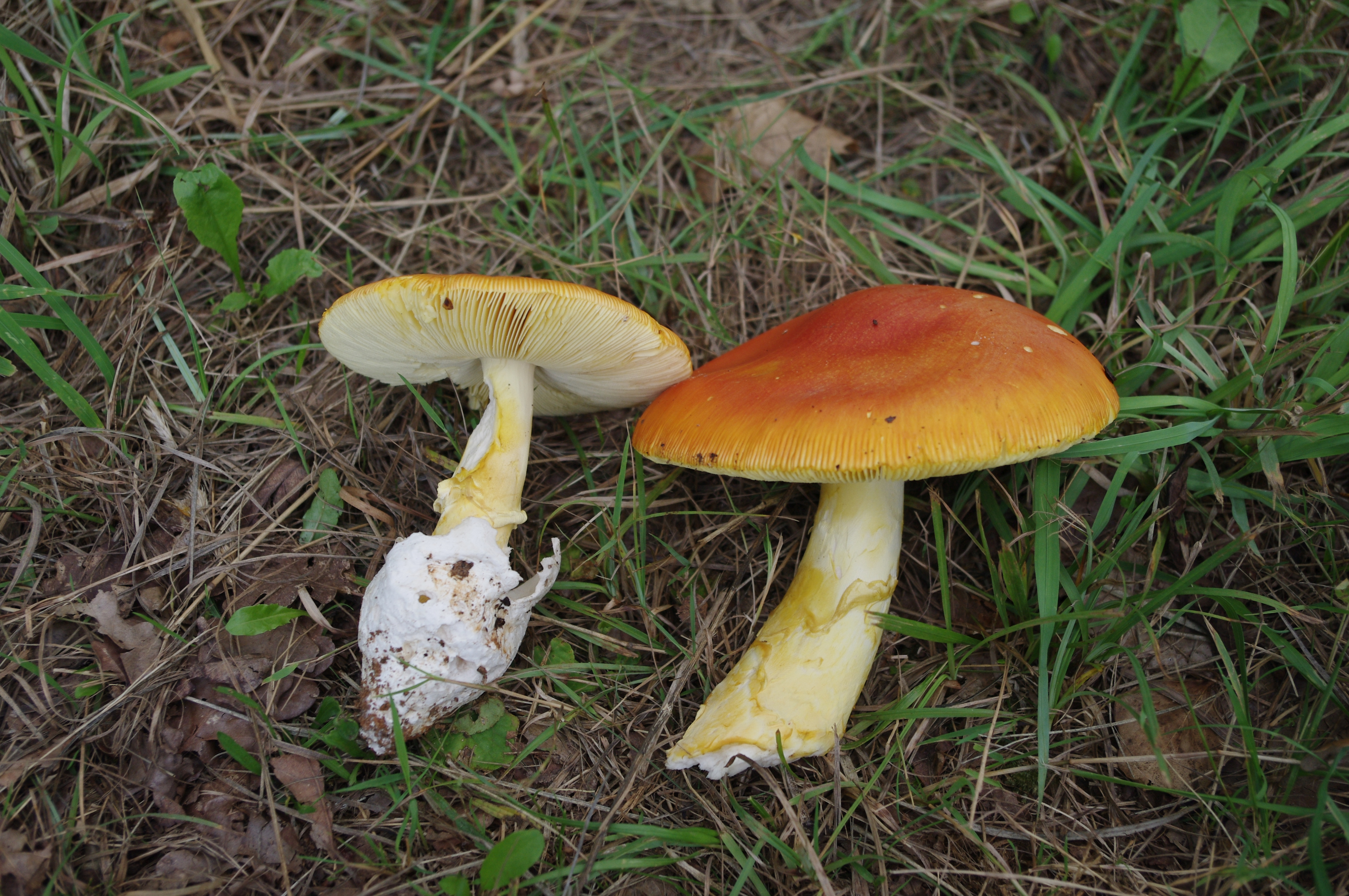 Oronge (amanita caesaeza) en Dordogne, France